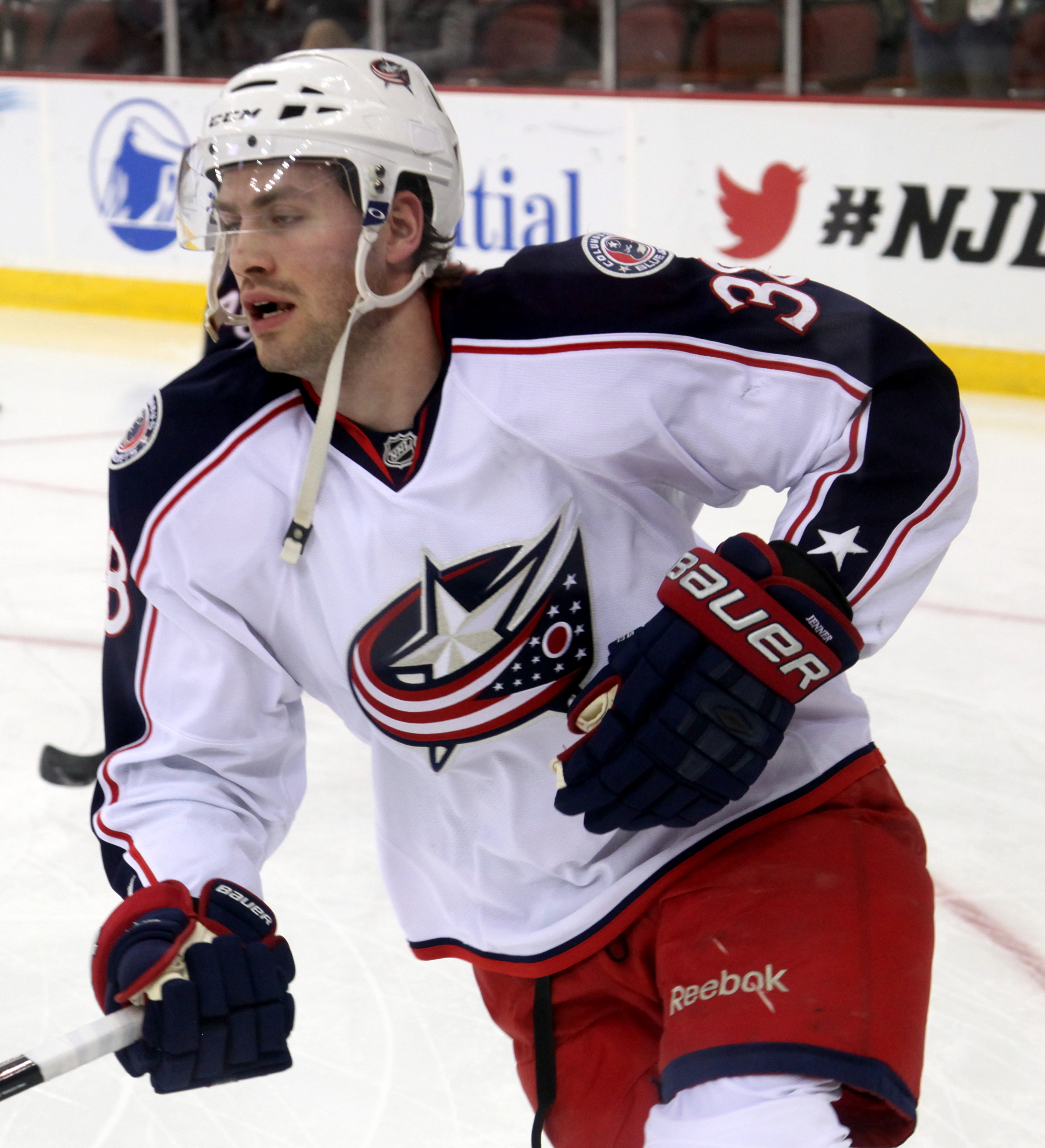 Jenner in 2014.